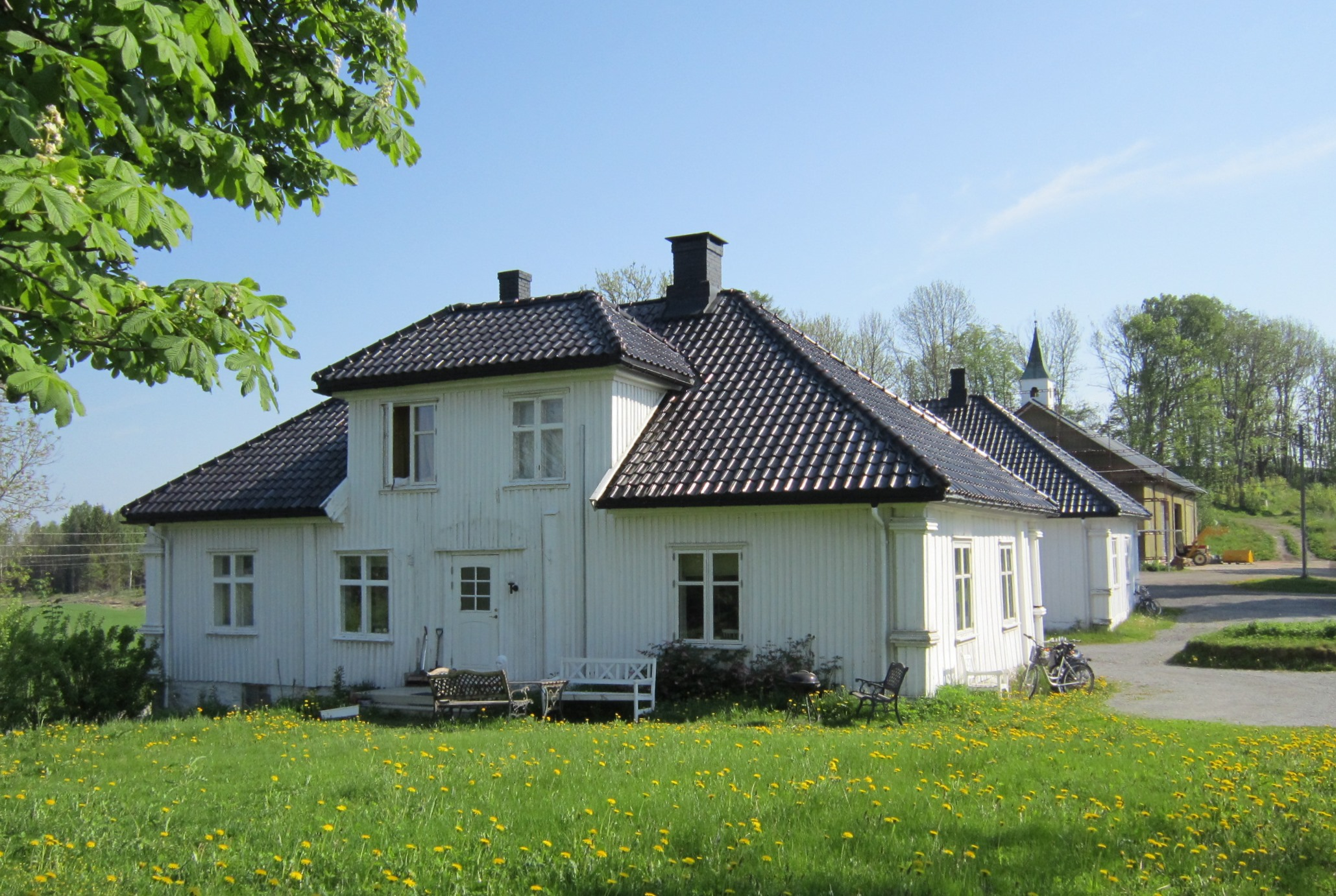 Froen gård i Frogn kommune